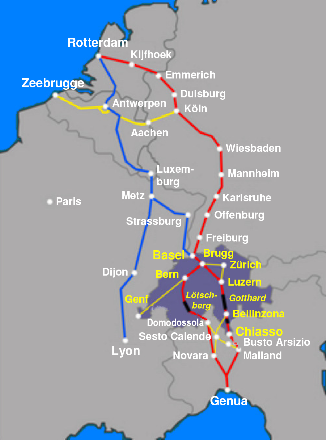 Der Güterverkehrskorridor 1 führt von Zeebrugge, Antwerpen oder Rotterdam über Basel und Chiasso (Gotthardachse) oder Domodossola (Lötschbergachse) nach Mailand und Genua. Der Korridor 2 führt von Rotterdam oder Antwerpen via Luxemburg unter anderem nach Basel.